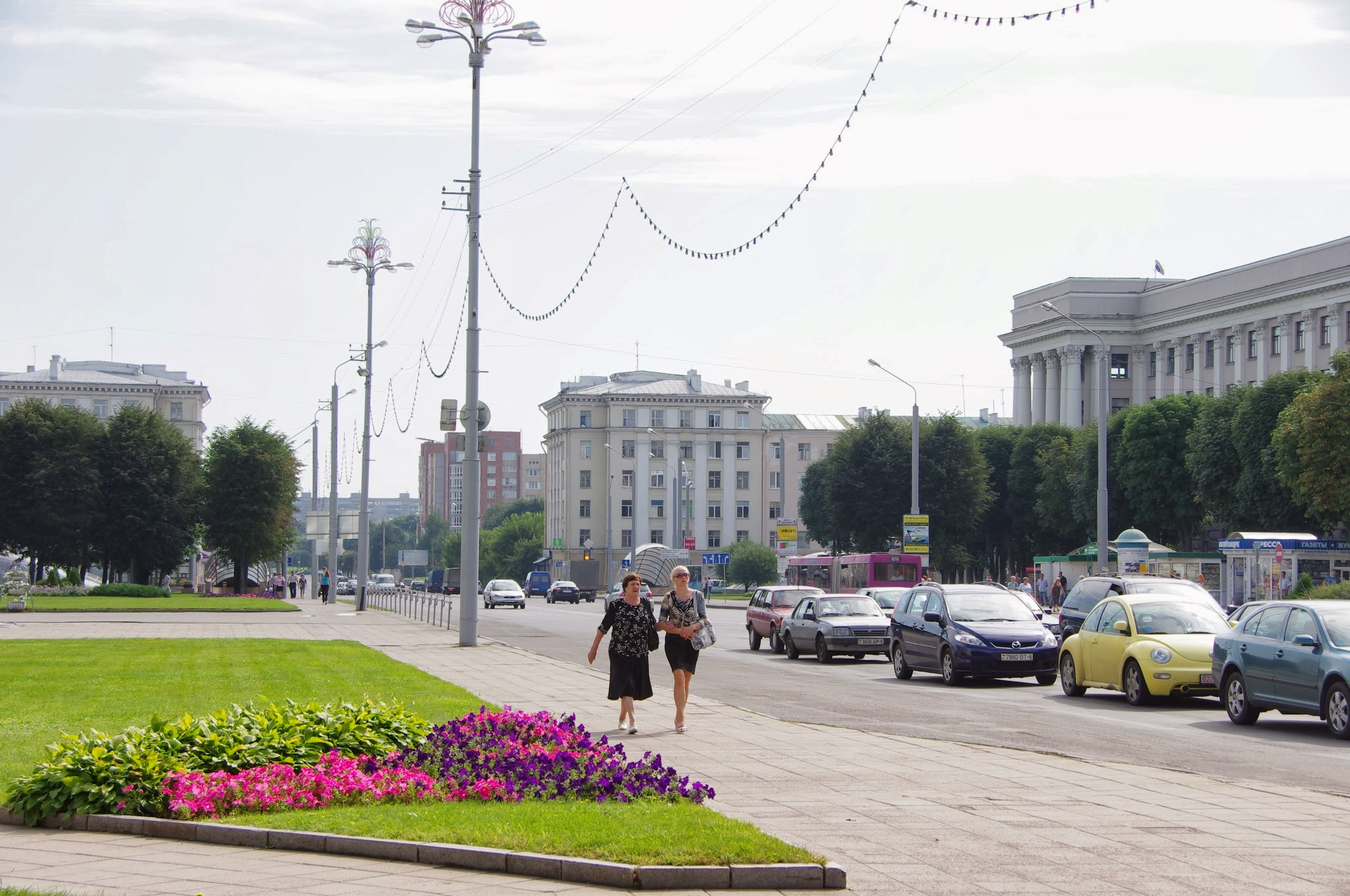 Lieninski District, Mogilev, Belarus